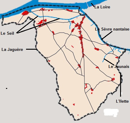 Localisation des principaux cours d'eau de Rezé.